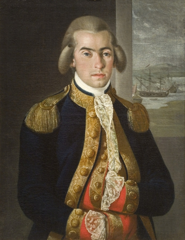 Óleo de Antonio Carnicero, "Retrato del Teniente de Navío Emparan", copia de este retrato fue donada a la Academia Nacional de la Historia de Venezuela el 1 de marzo de 2012 por la familia Hidalgo-Parés, descendientes en Venezuela de la casa de Emparan.